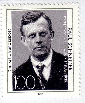 Briefmarke von Pfarrer Paul Schneider